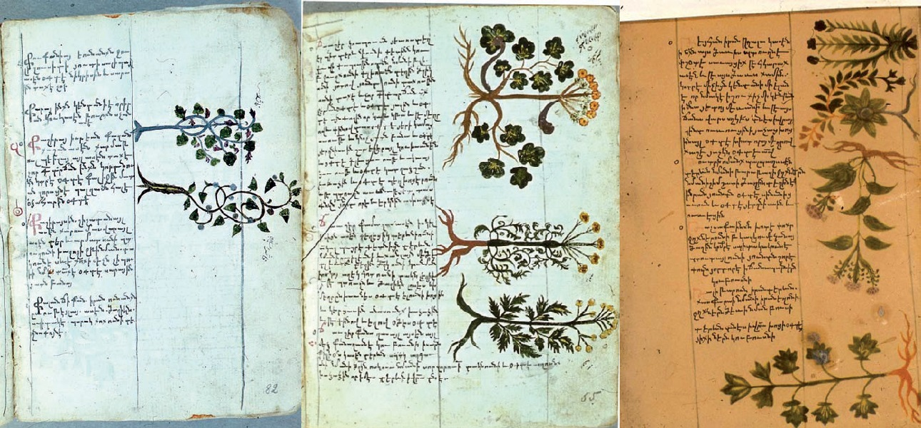 «Иллюстрированный словарь простых лекарственных веществ», армянский медицинский словарь начала XVIII века. «Иллюстрированный словарь простых лекарственных веществ», армянский медицинский словарь начала XVIII века.